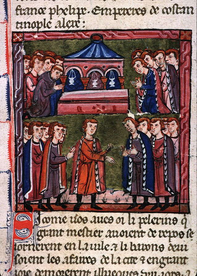 Guillaume de Tyr, Histoire d'outremer, manuscrit sur parchemin vers Ms 1280 f. 83 : Godefroi de Bouillon prie au Saint-Sépulchre - Election de Godefroi de Bouillon comme avoué du Saint-Sépulchre (1099).